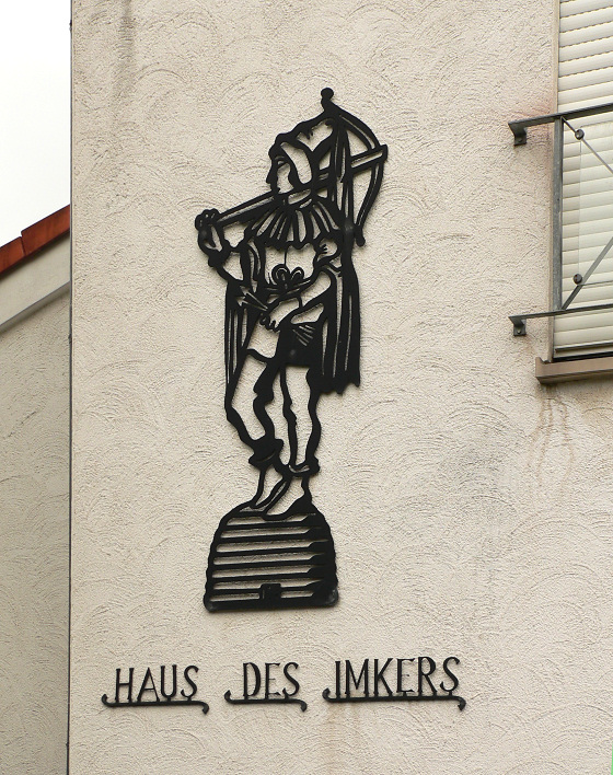 Zeidler-Figur am Haus des Imkers in Villip, Villiper Hauptstraße 3